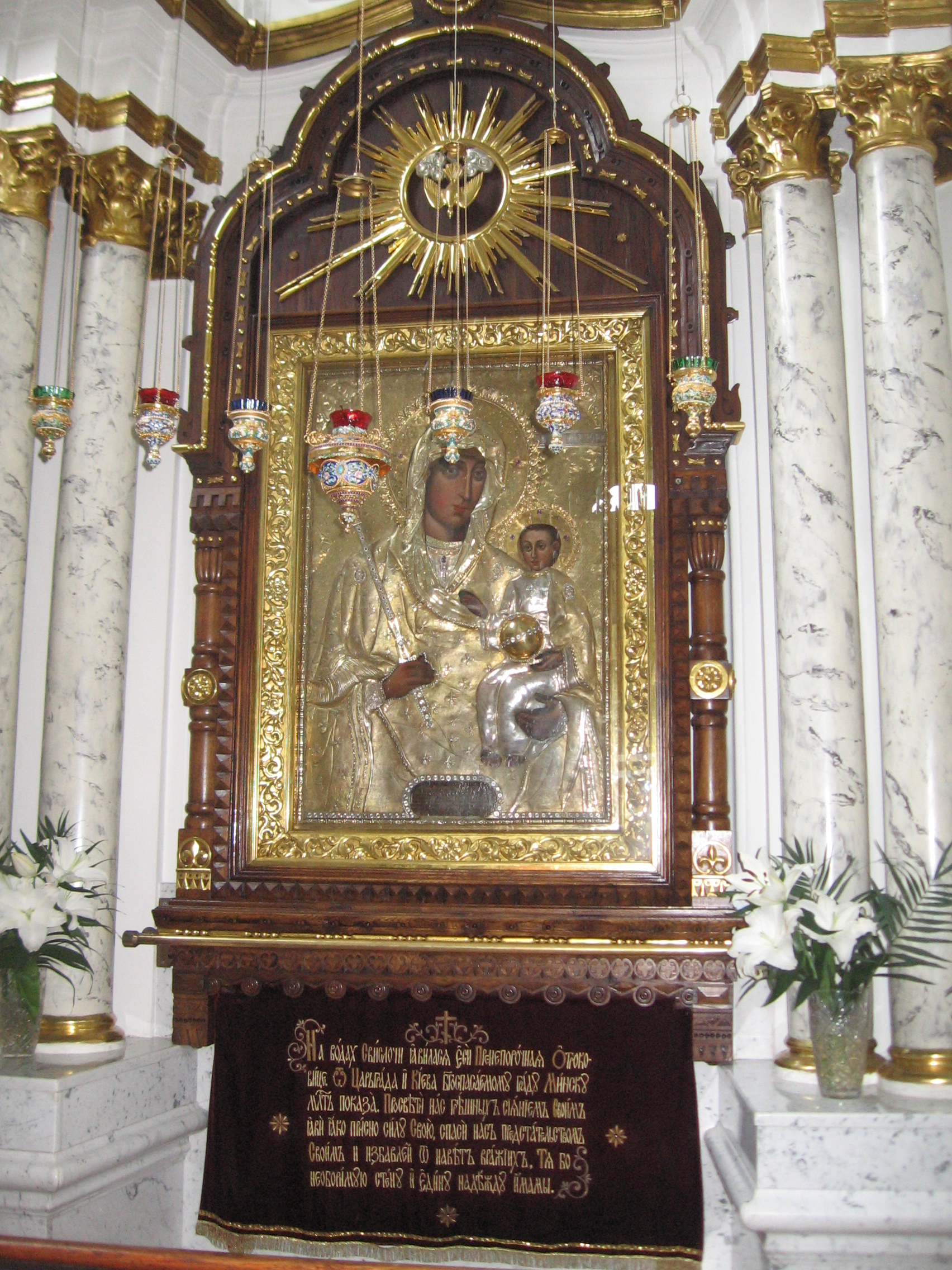 Чудотворная икона Казанской Божией Матери. Минск, Кафедральный собор Сошествия Святого Духа